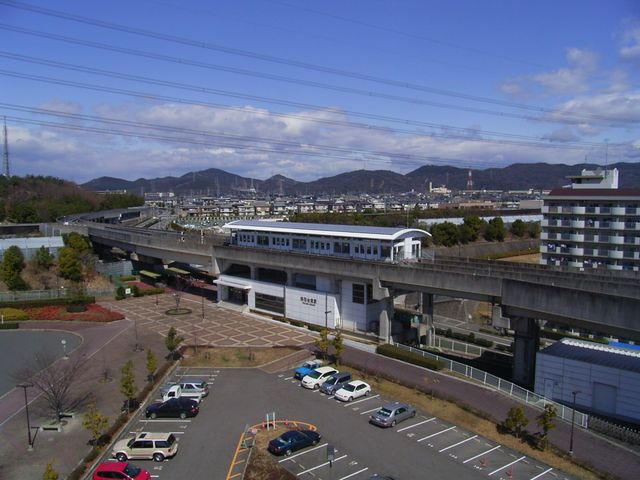 2006年3月に、投稿者が撮影。駅前は小さな広場になっており、ベンチも設置されている。写真左隅にあるのは、ロータリー。ピーチバスや名鉄バスの高速バスが停車する停留所がある。